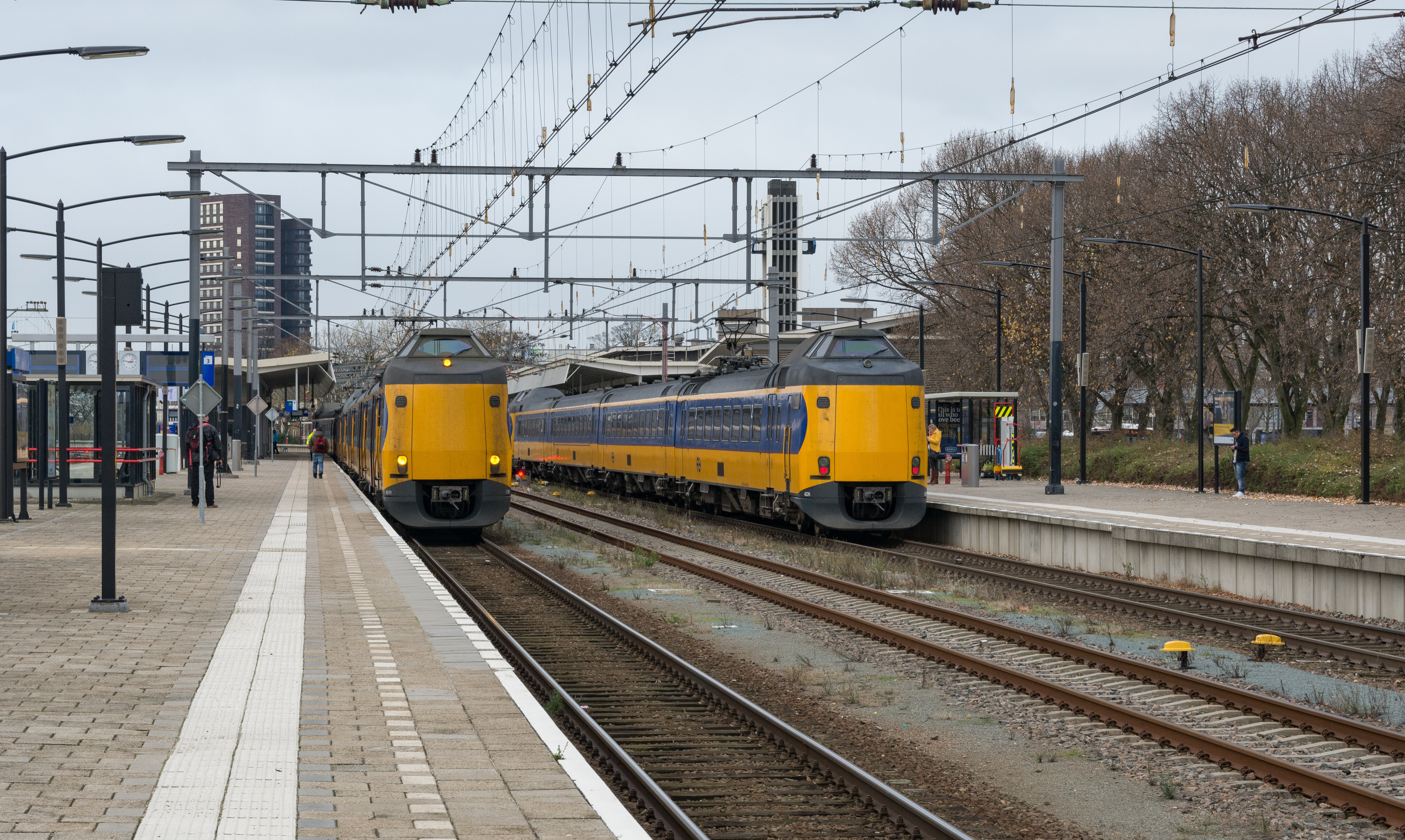 Aankomst in Venlo van ICMm 4249-4063 (l) als trein 1945 uit Den Haag en klaar voor vertrek ICMm 4084-4226 (r) trein 1954.